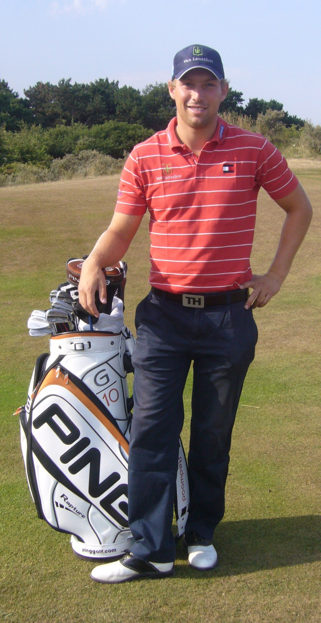 Floris de Vries op KLM Open 2009